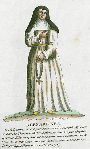 Collection de costumes de tous les ordres monastiques, supprimés à differentes époques, dans la ci-devant Belgique, Bruxelles, Philippe Joseph Maillart et sœur, 1811